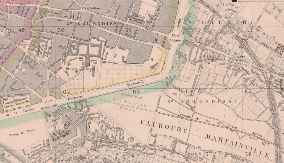 Détail plan de la ville de Rouen, avec l'emplacement projeté de l'installation de la gare de Rouen Martainville (plublié en 1868)